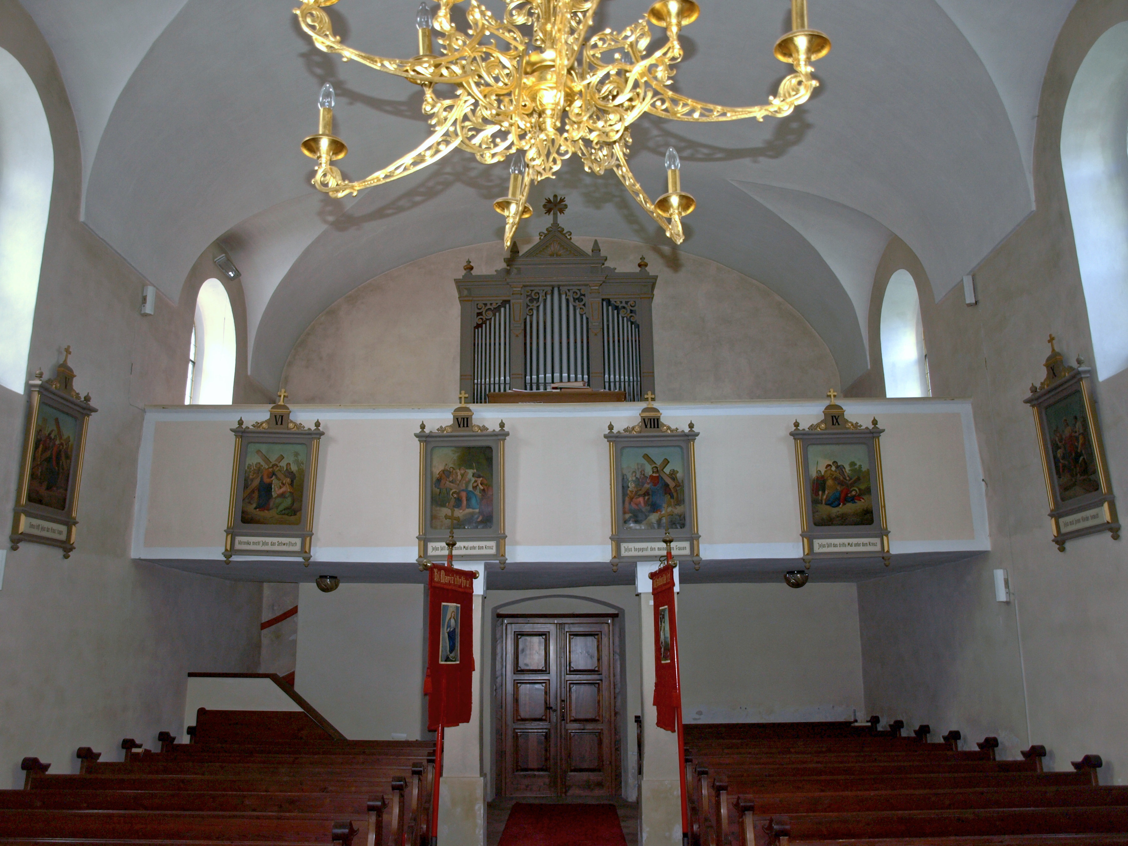 Kath. Pfarrkirche hl. Anna - Orgel (Franz Josef Swoboda, 1907)